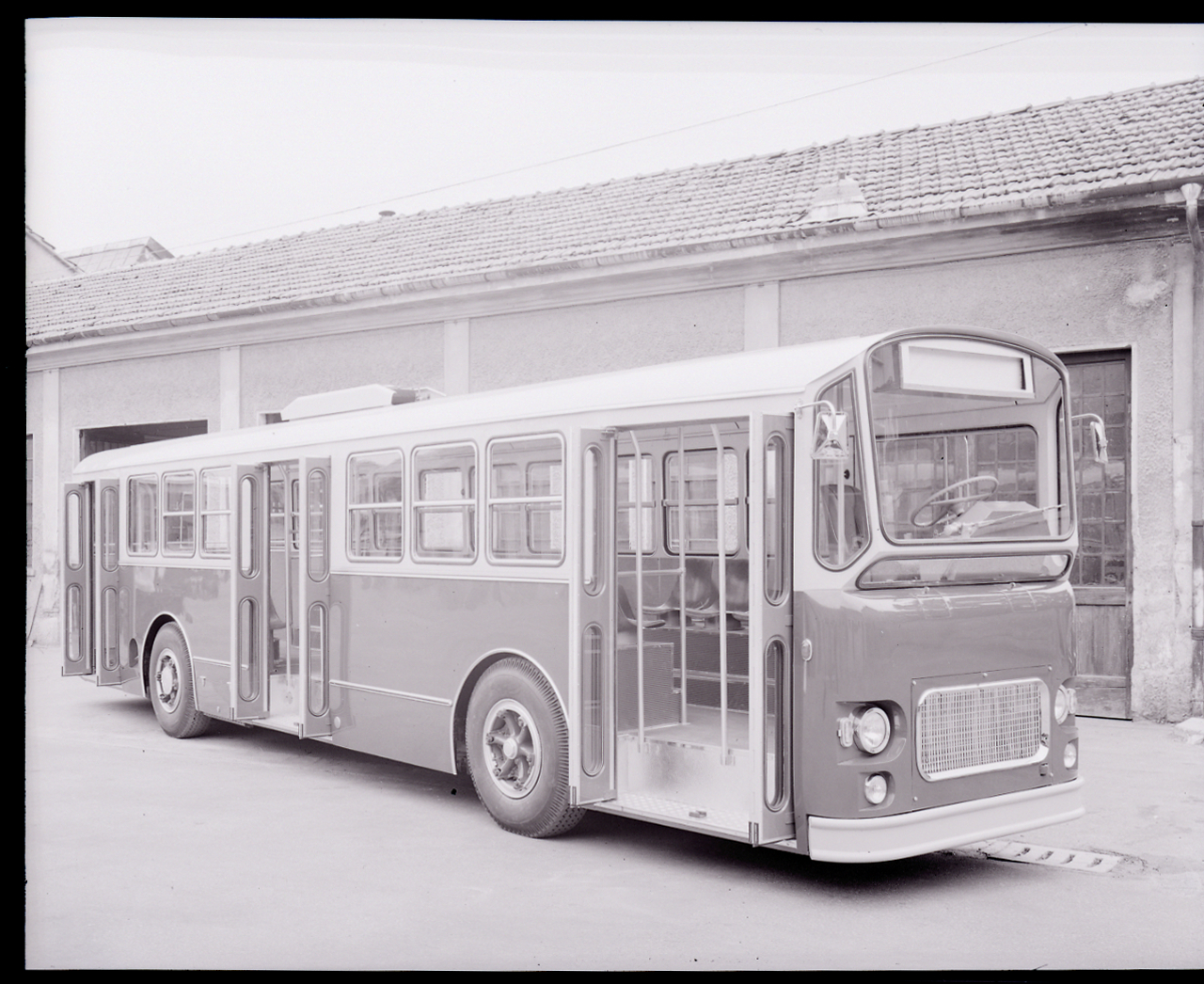 Padova. Pubblicità autosnodati. Esterni e interni con posti a sedere e cabina del conducente, motore e impianti. particolari Servizio fotografico : Padova, 1968 / Paolo Monti. - Buste: 44, Fototipi: 49 : Negativo b/n, gelatina bromuro d'argento/ pellicola ; 10x12. - ((Serie costituita da 44 buste sciolte di negativi identificati con i nn.: 14326A, 14327, 14328, 14329, 14330, 14331, 14332, 14333, 14334, 14335, 14336, 7, 14338, 14339, 14340, 14341, 14342, 14343, 14344, 14345, 14346, 14347, 14348, 14349, 14350, 14351, 14352, 14353, 14354, 14355, 14356, 14357, 14358, 14359, 14360, 14361, 14362, 14363, 14364, 14365, 14366, 14367, 14368, 14369. - Nel 1967 iniziarono i lavori per la costruzione di nuovi capannoni che ospiteranno l'industria nei primi anni Settanta; nella nuova sede si costruirono i primi autosnodati Fiat 410 e 418 O.M.S. da 18 metri. - Occasione: Documentazione per pubblicità autobus snodabile. - di Paolo Monti: IV. Commesse/ Fattura/ Fotografie per pubblicità autobus snodabile (1968/06/25). Ordinazione del Signor Ing. Villa. Fotografie esguite a Padova. - Fonte: Agenda di Paolo Monti: Monti/ 3 aprile 1966 - 9 marzo 1971/ 12421-16823 (1966-1971), presso Archivio Paolo Monti. - Fonte: Fattura